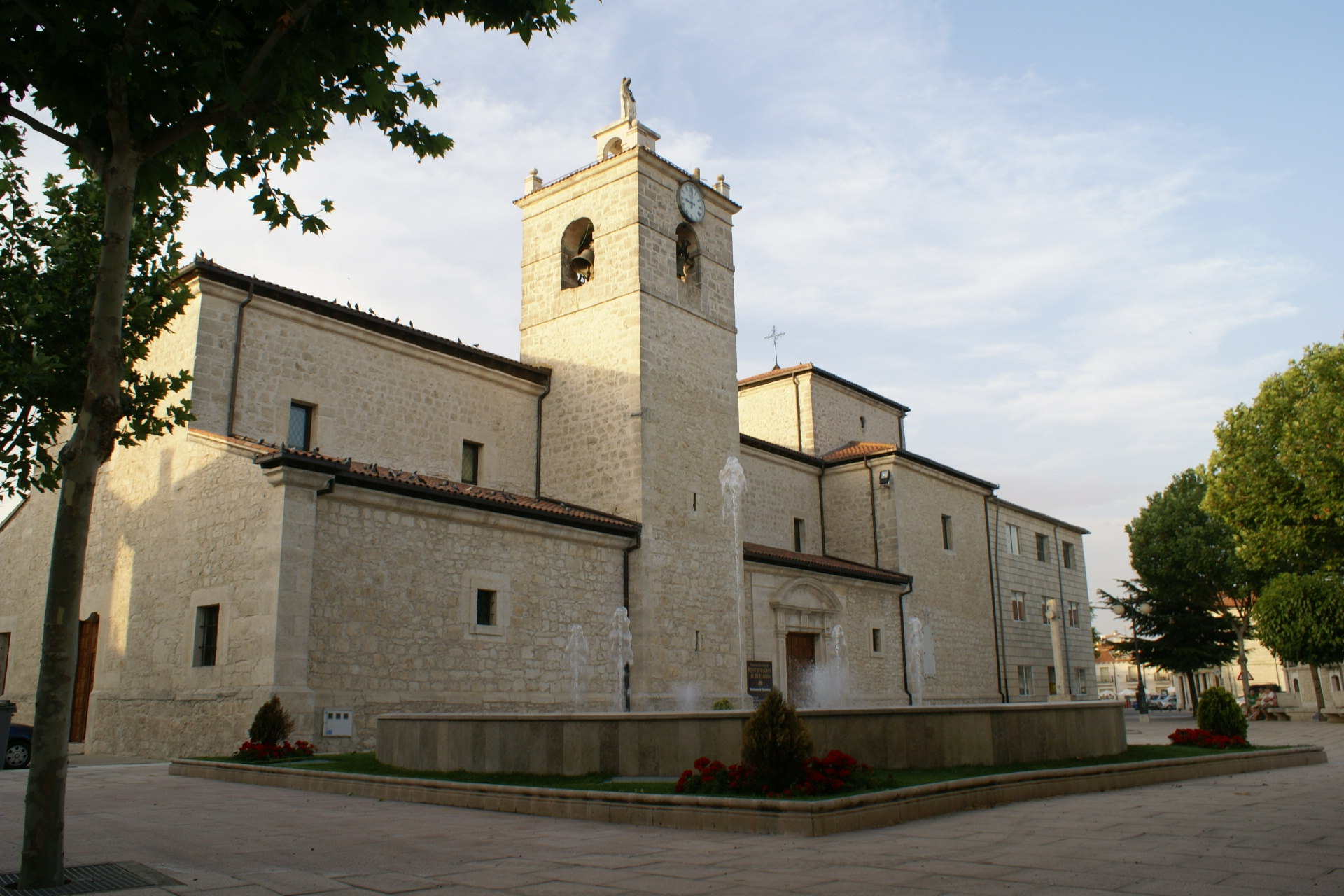 Iglesia de Santo Domingo de Guzmán de Campaspero, Valladolid.